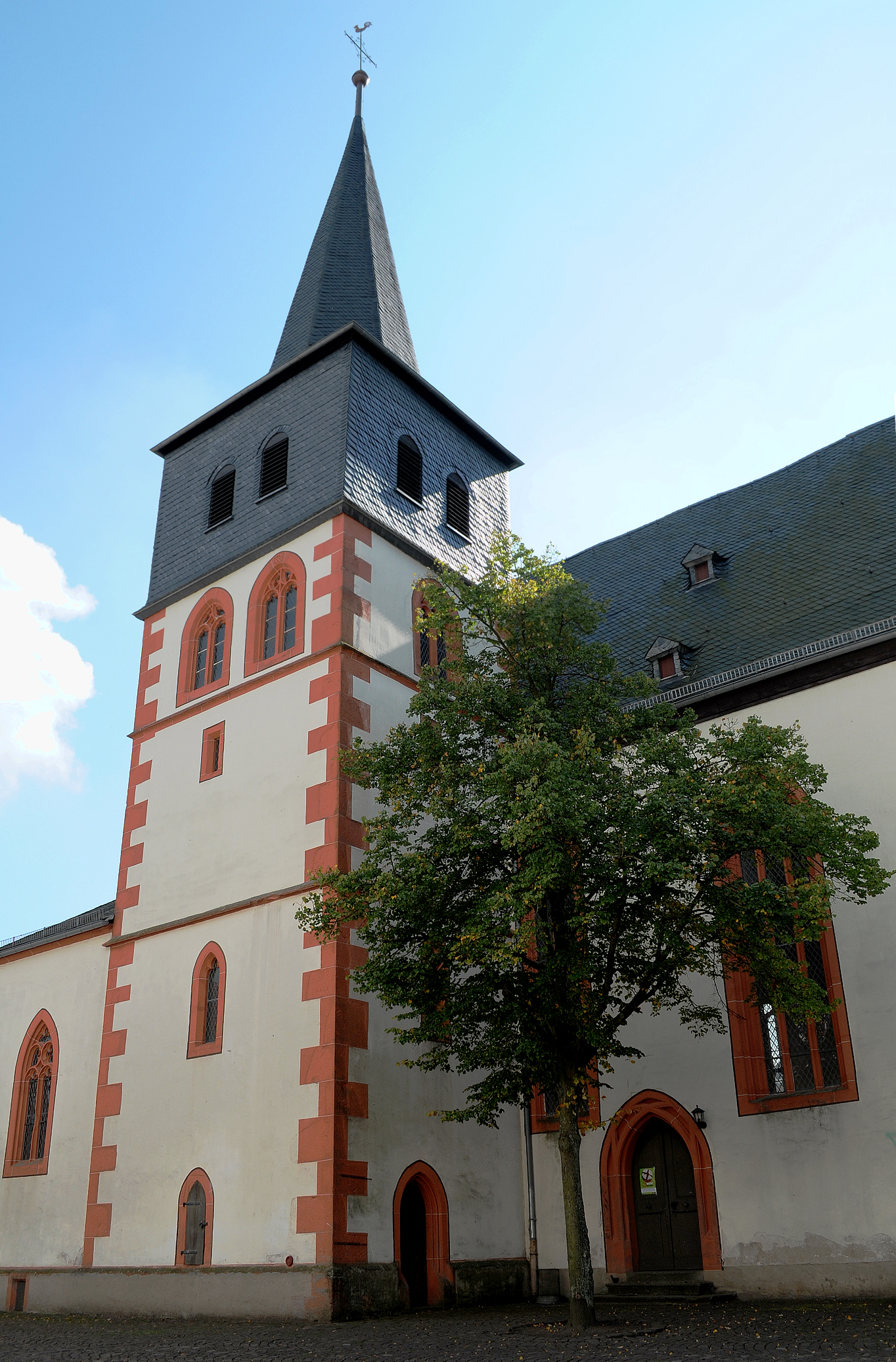 Kirchturm der Katharinenkirche – Die Aufnahme wurde von der Brüder-Grimm-Straße, 36396 Steinau an der Straße, aus gemacht.